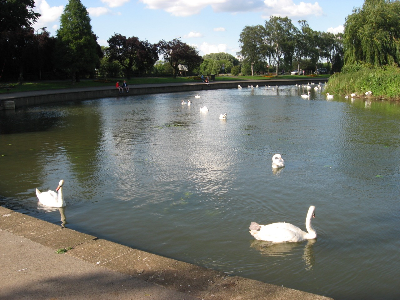 rzeka Nene w Wellingborough